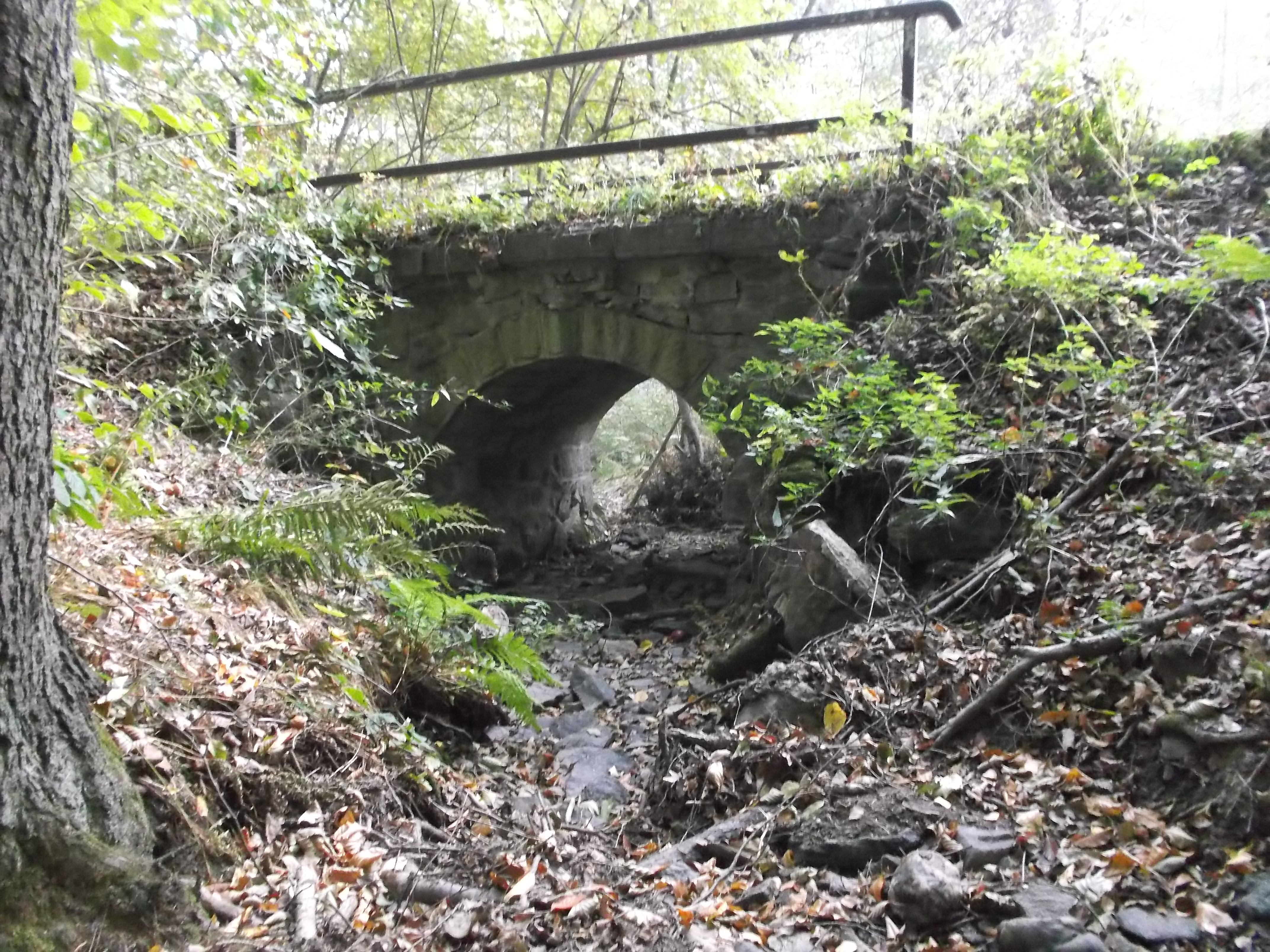 Diese alte Bahnbrücke wurde 1881 für die Weißeritztalbahn erbaut und diente bis zur Demontage der Gleise im Juni 1914 seit wann Sie als Wanderweg dient. Durch diese Fließt der ,,Gründelbach""